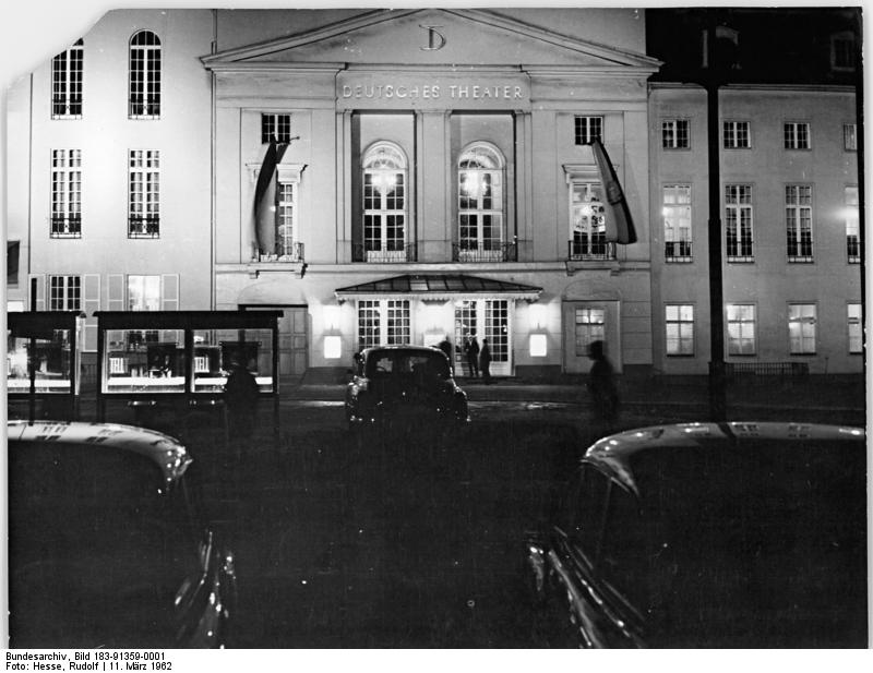 Berlin, Deutsches Theater, Nacht Zentralbild Hesse 11.3.1962 Deutsches Theater mit Schillers "Tell" festlich wiedereröffnet Das baulich und technisch erneuerte und reonovierte Deutsche Theater, die traditionsreichste Sprechbühne Berlins deren Weltruf Künstler wie Otto Brahm und Max Reinhardt begründeten, wurde am 10.3.1962 mit Schillers "Wilhelm Tell" wiedereröffnet. Nach fast dreijähriger Umbaupause - das Haus in der Berliner Schumannstraße erhielt u. a. eine neue Bühnentechnik - hob sich der Vorhang erstmals vor dem großen nationalen Volksschauspiel, das Intendant Wolfgang Langhoff aus neuer Sicht inszenierte. UBz: Außenansicht des Deutschen Theaters am Abend der feierlichen Wiedereröffnung.